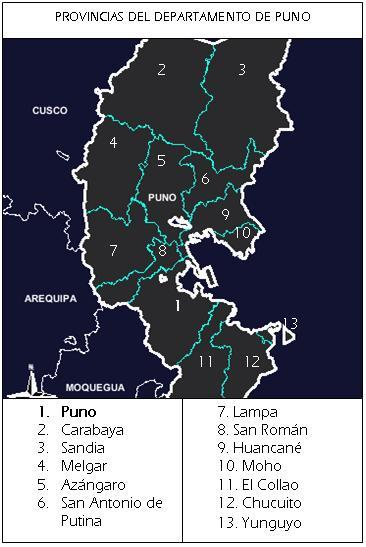 División política de Puno. Puno prov. 222